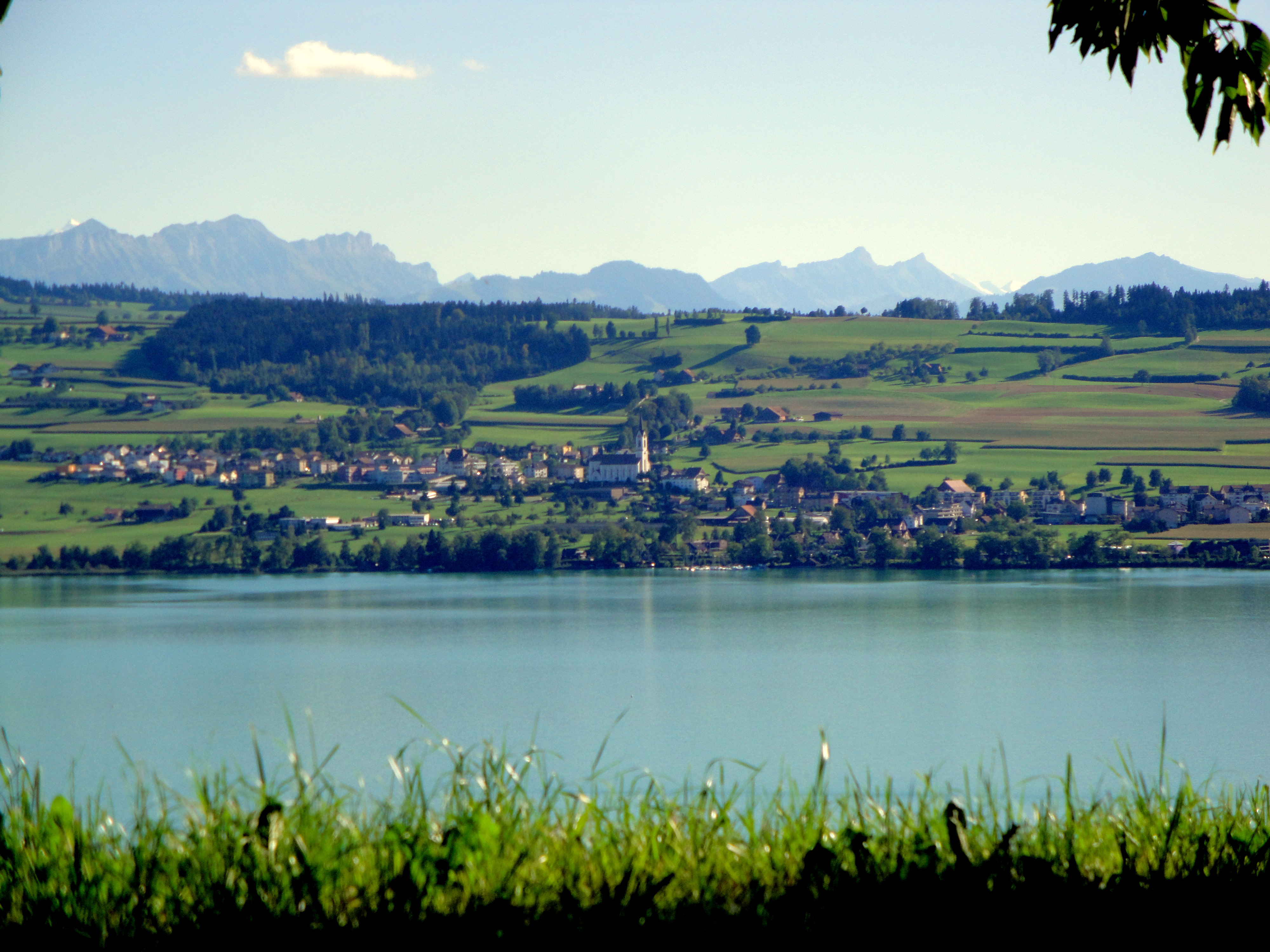 Nottwil (aus Norden)